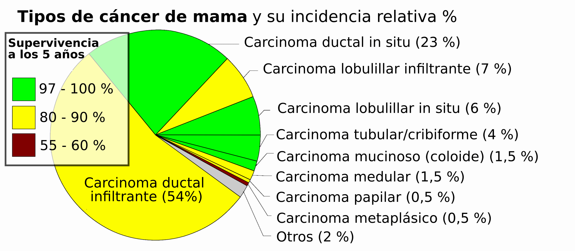 Gráfico circular de incidencia y pronóstico de los tipos de cáncer de mama histopatológico. Lecturas adicionales: en: Clasificación del cáncer de mama